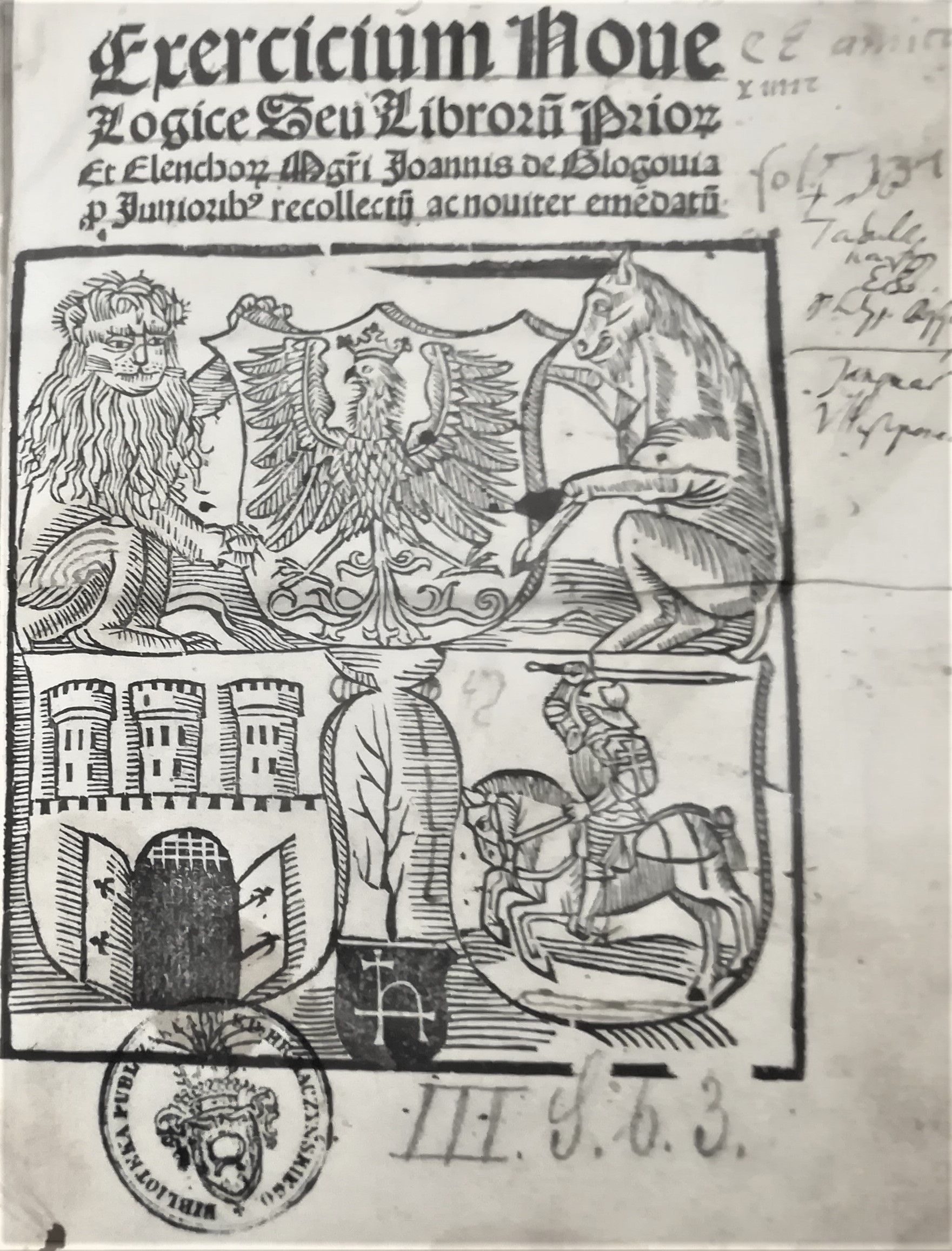 "Exercitium nove logice" Jana z Głogowa w zbiorach Biblioteki Raczyńskich w Poznaniu.